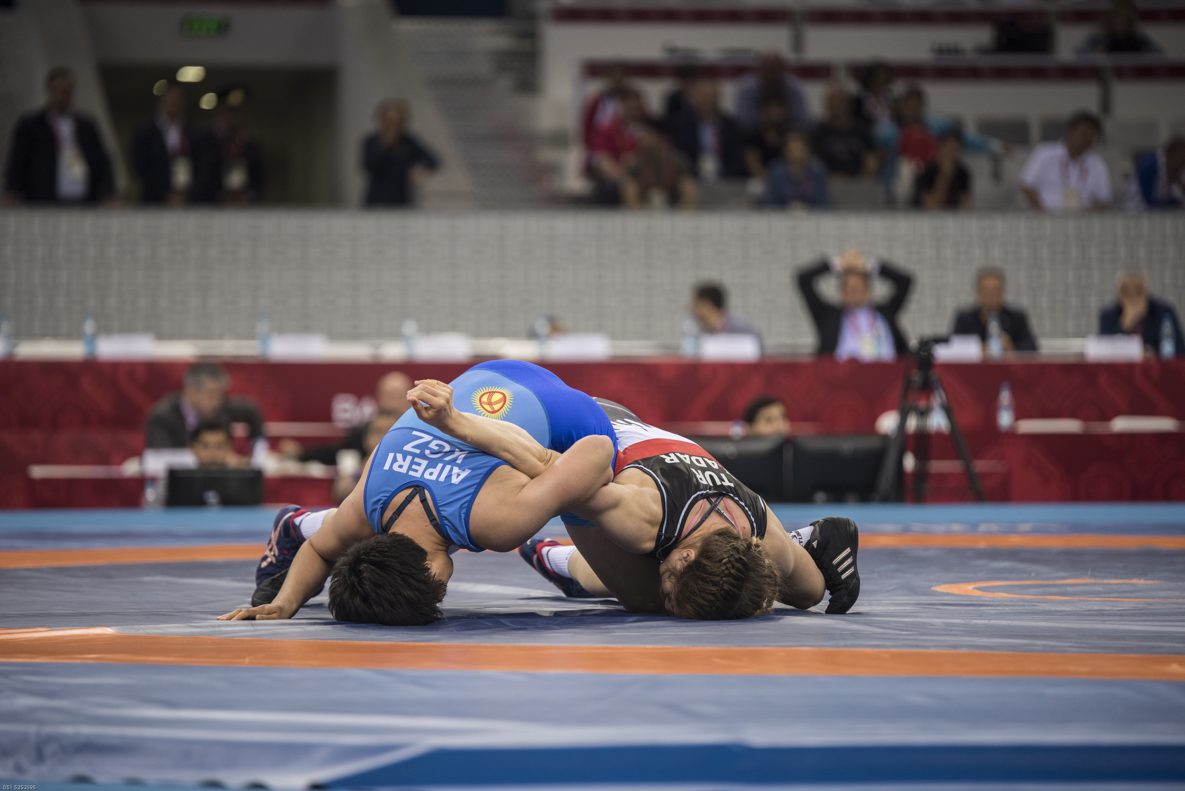 The Islamic Solidarity Games (Arabic: ألعاب التضامن الإسلامي) is a multinational, multi-sport event. The Games involve the elite athletes of the Organisation of the Islamic Conference. The Islamic Solidarity Sports Federation (ISSF) is the organisation that is responsible for the direction and control of the Islamic Solidarity Games.[1] Baku 2017 Islamic Solidarity Games